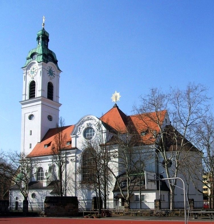 Fürth, kath. Kirche St. Heinrich